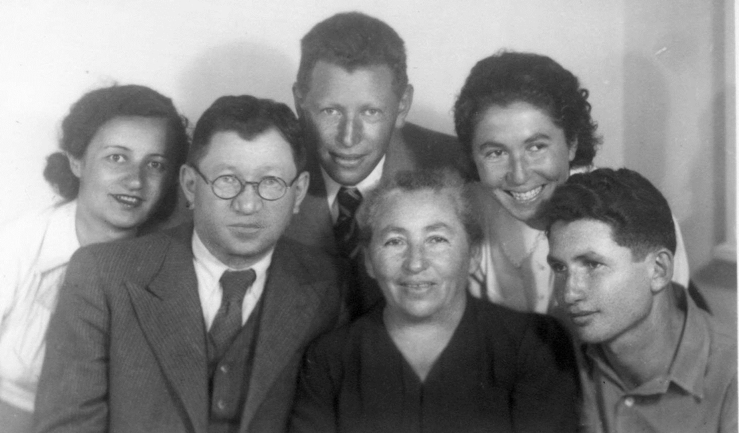 משפחת זכאי מימין לשמאל אברהם , האחות חנה האם רחל, האח יעקב האב דוד זכאי ואירמה רעייתו של יעקב, פסח תש"א.